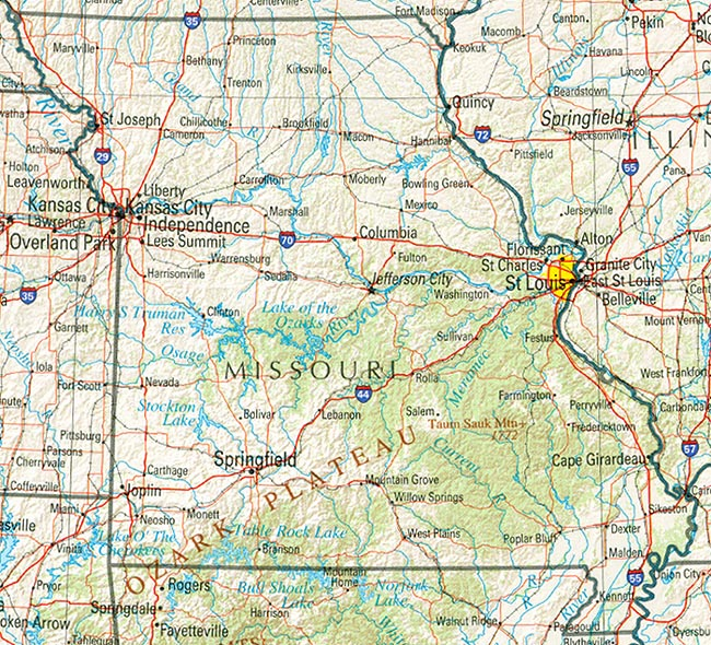 Karte Missouris